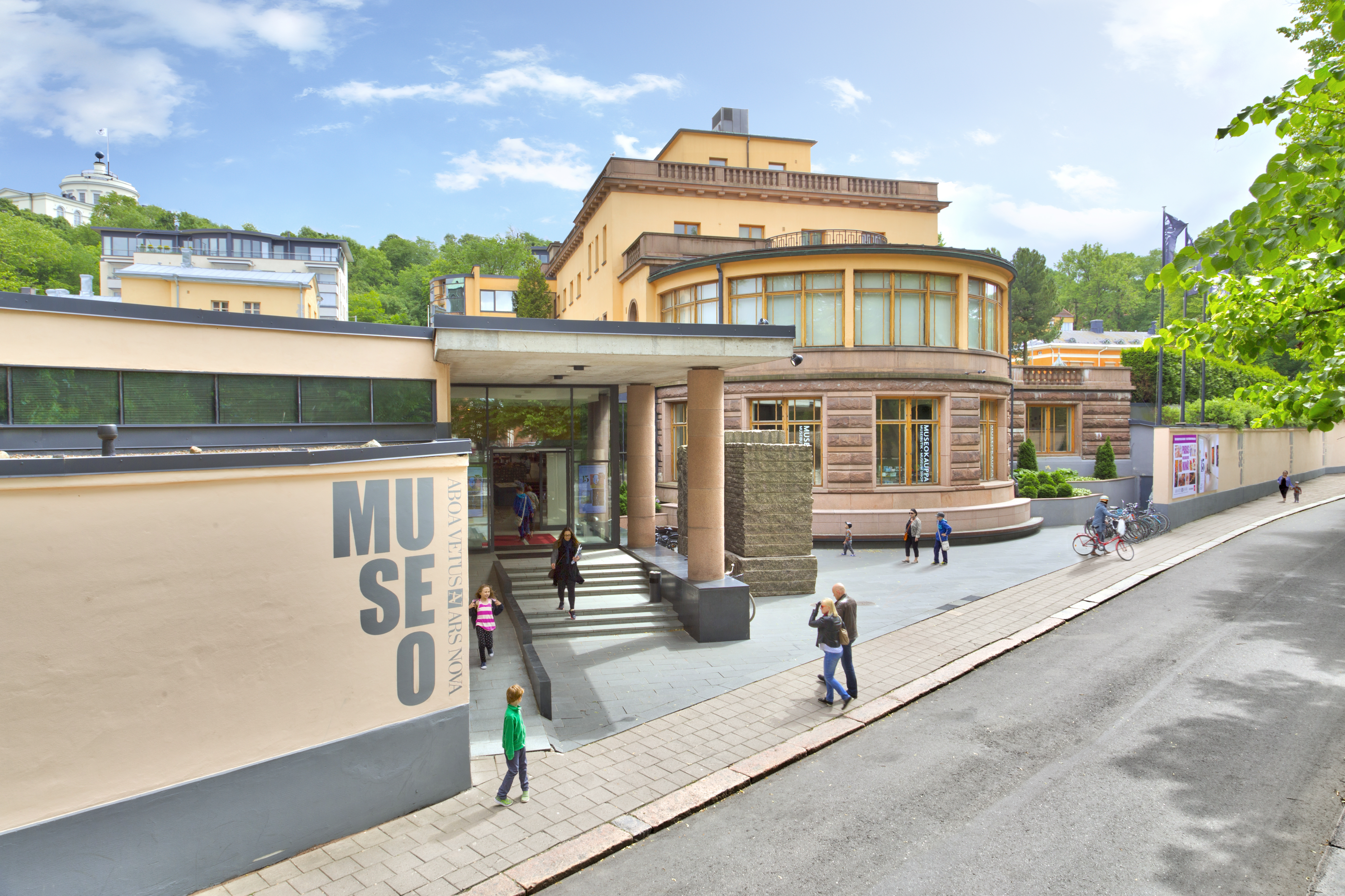 Aboa Vetus & Ars Nova ulkokuva 2016